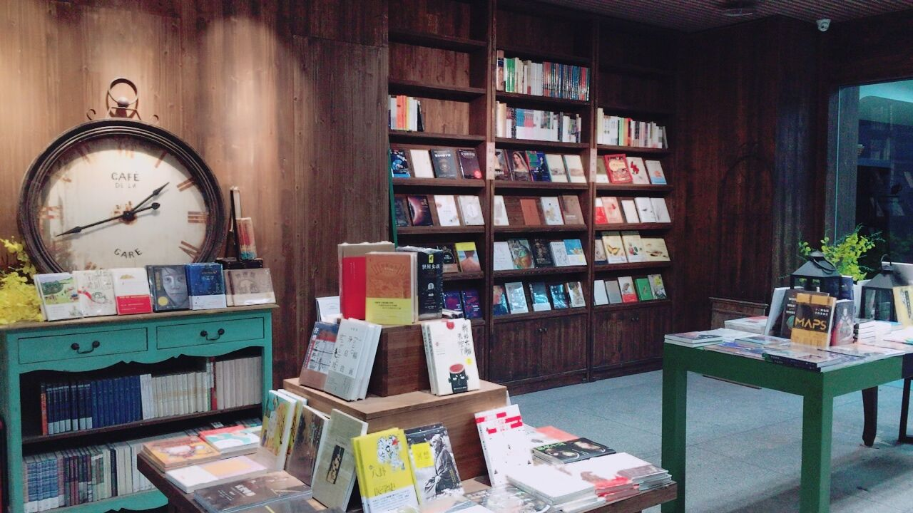 福建教育出版社大梦书屋八中店在福州第八中学三江口校区内，图为店内陈设。